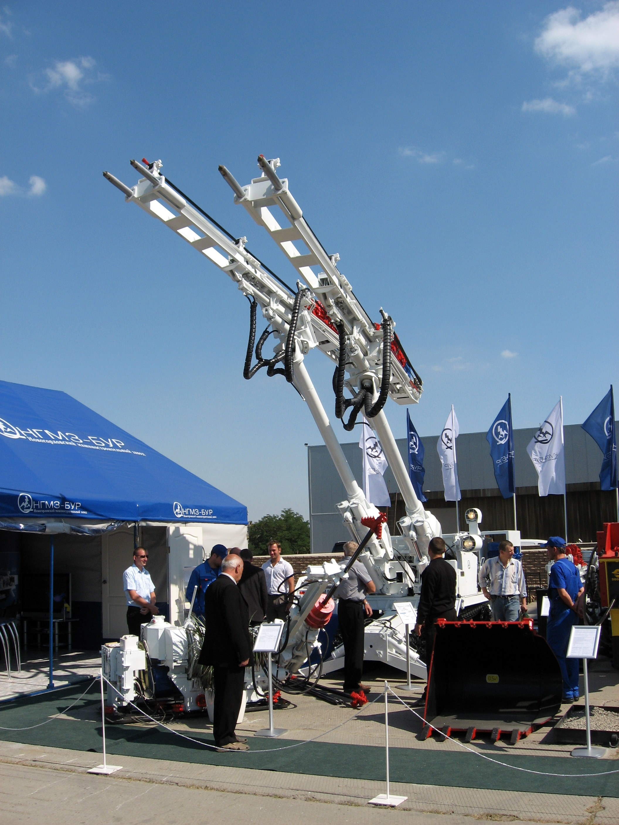 Фото з виставки Вугілля-Майнінг 2008